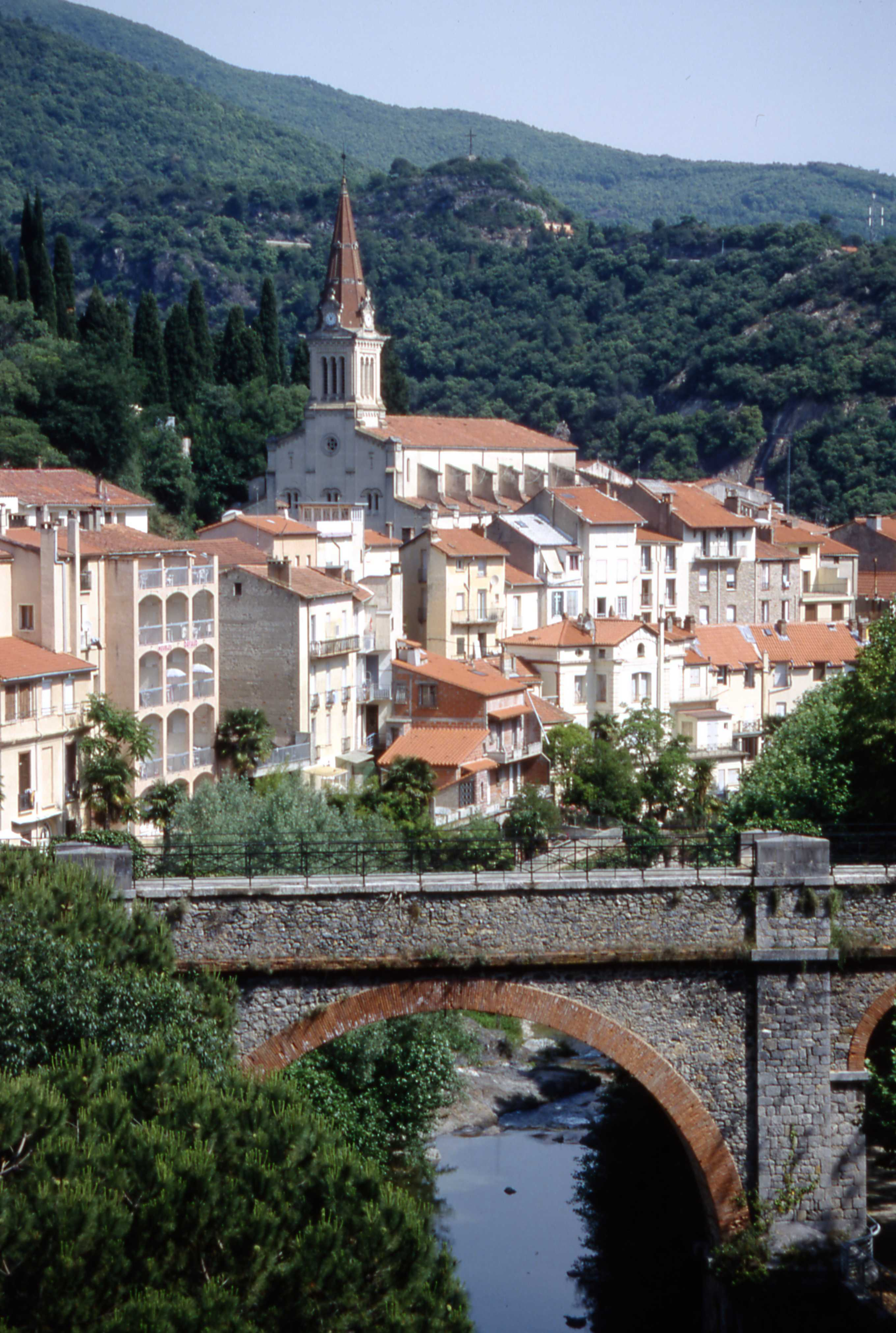 La rivière "Le Mondony" et l'église paroissiale "Notre-Dame-de-Vie". Amélie-les-Bains-Palalda, Pyrénées-Orientales, France.